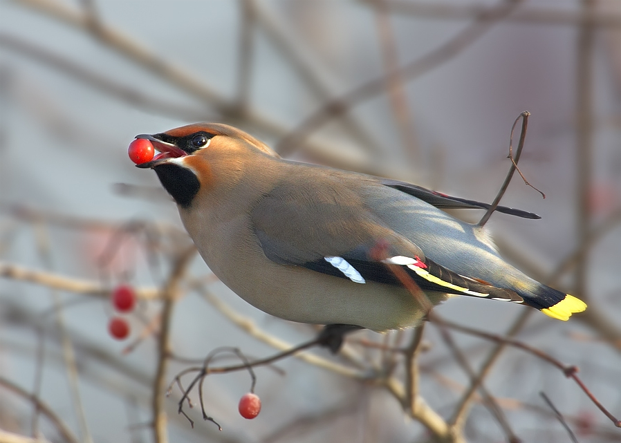 Bombycilla garrulus, Olomoucko, CZ